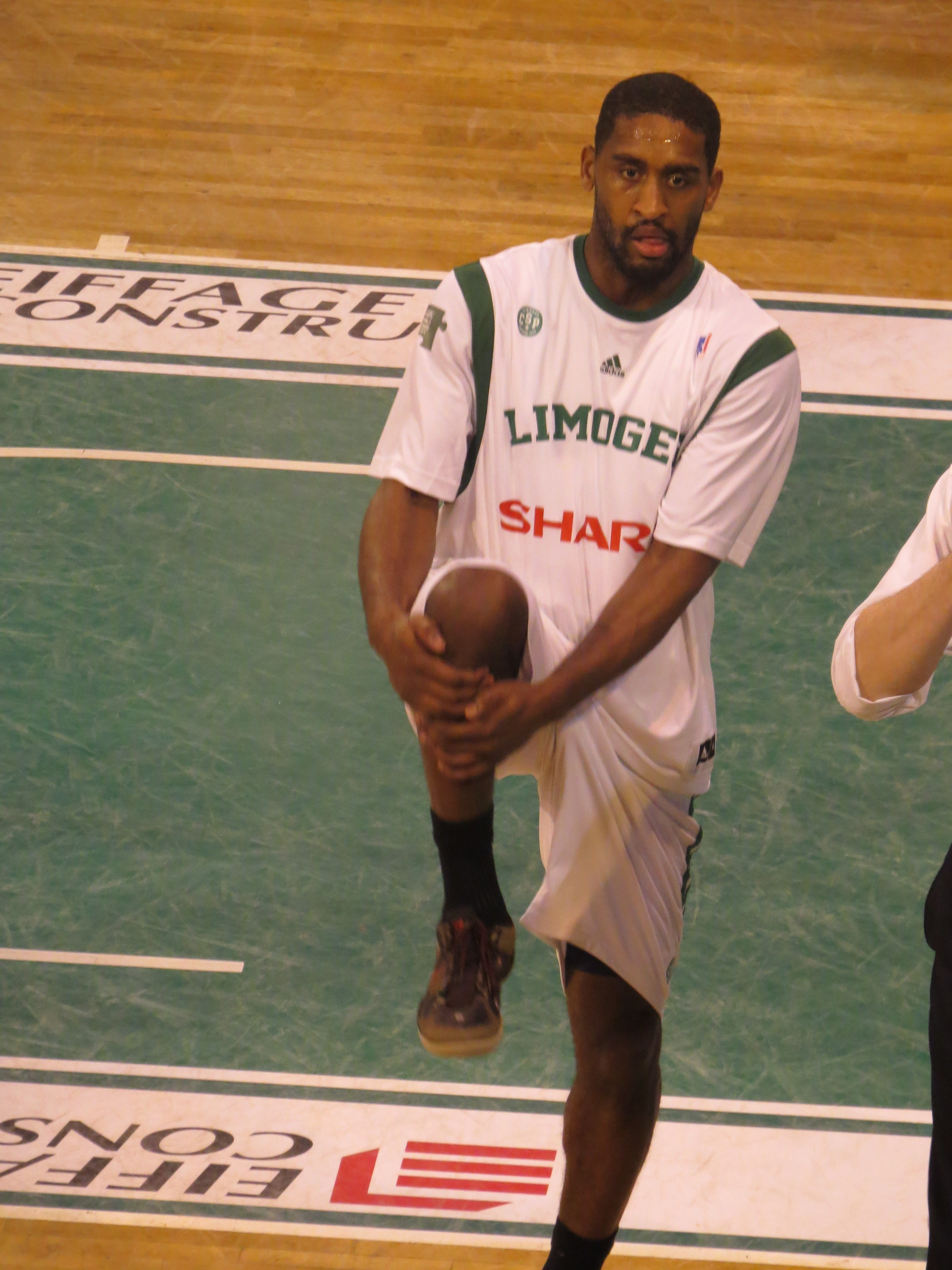 échauffement de Wanamaker